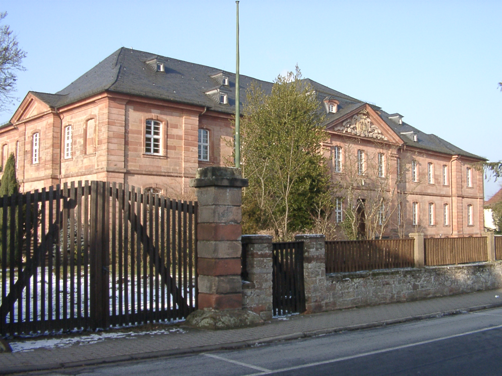 Das Trippstadter Schloss